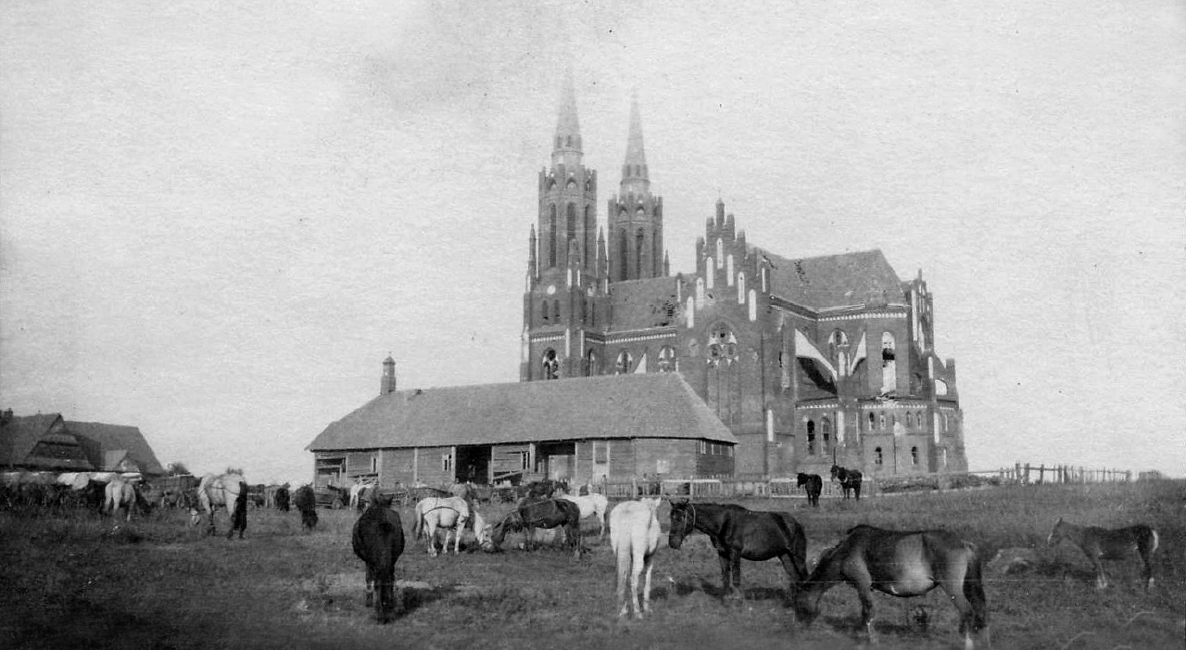 Беларуская (тарашкевіца): Ліпск (Lipsk). Старая Багародзіцкая царква і новы касьцёл